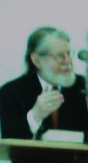 Robert W. Jenson, luthers en oecomenisch theoloog